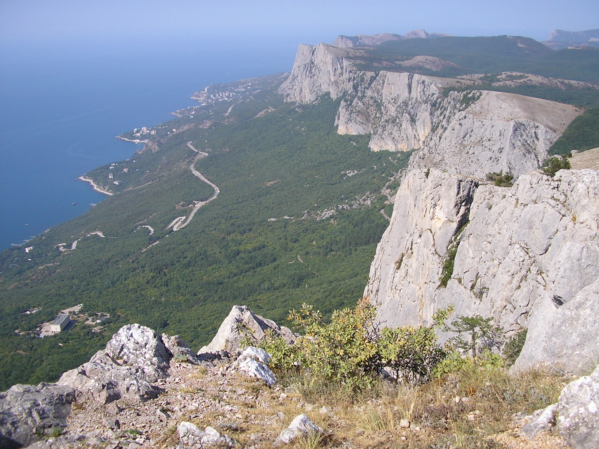 Западная часть Ай-Петринской Яйлы